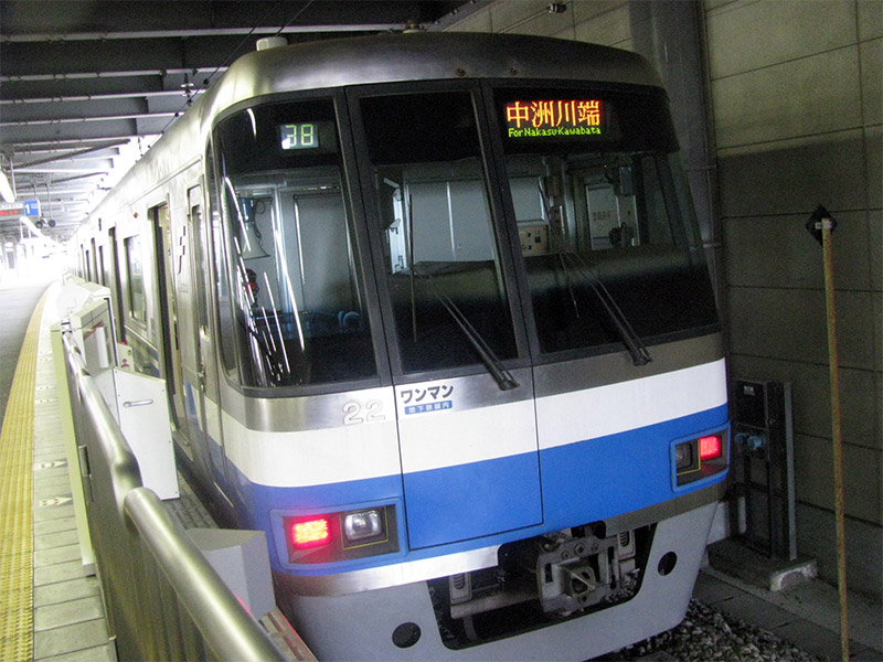 地下鉄_空港線_貝塚駅にて撮影